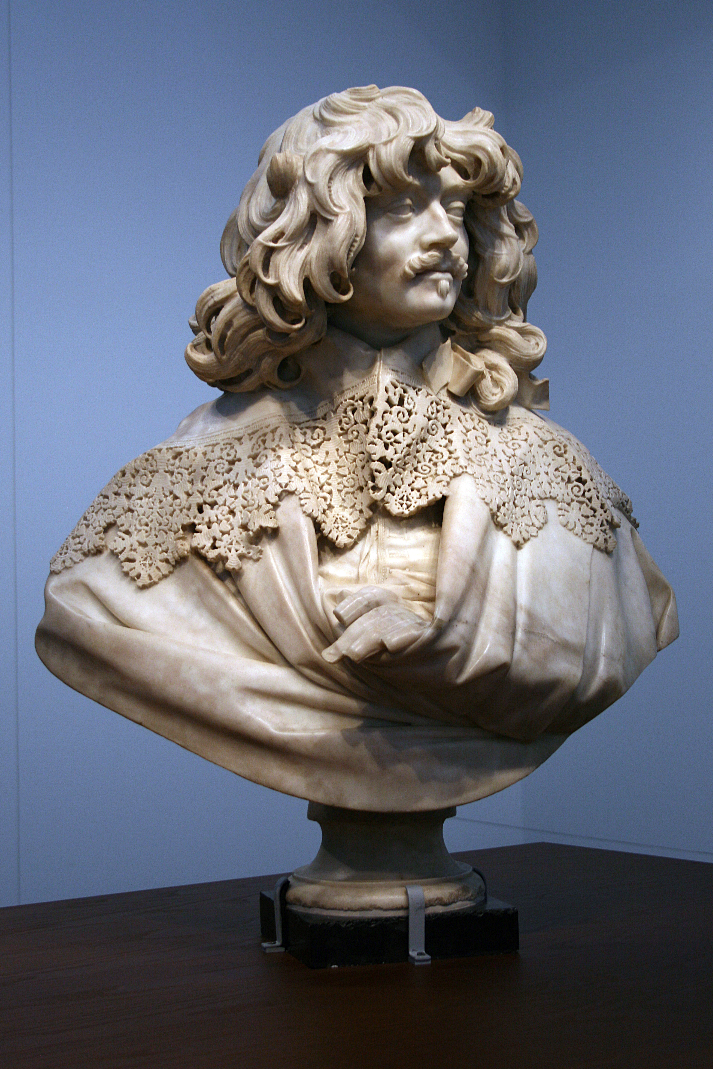 Buste de Thomas Baker (1606-1658) - Œuvre en marbre de Gian Lorenzo Bernini, dit Le Bernin ou Cavaliere Bernini réalisée vers 1638 - Victoria & Albert Museum (A,63:1,2-1921). - Exposition temporaire "L'Europe de Rubens" au Musée du Louvre à Lens (Pas-de-Calais).